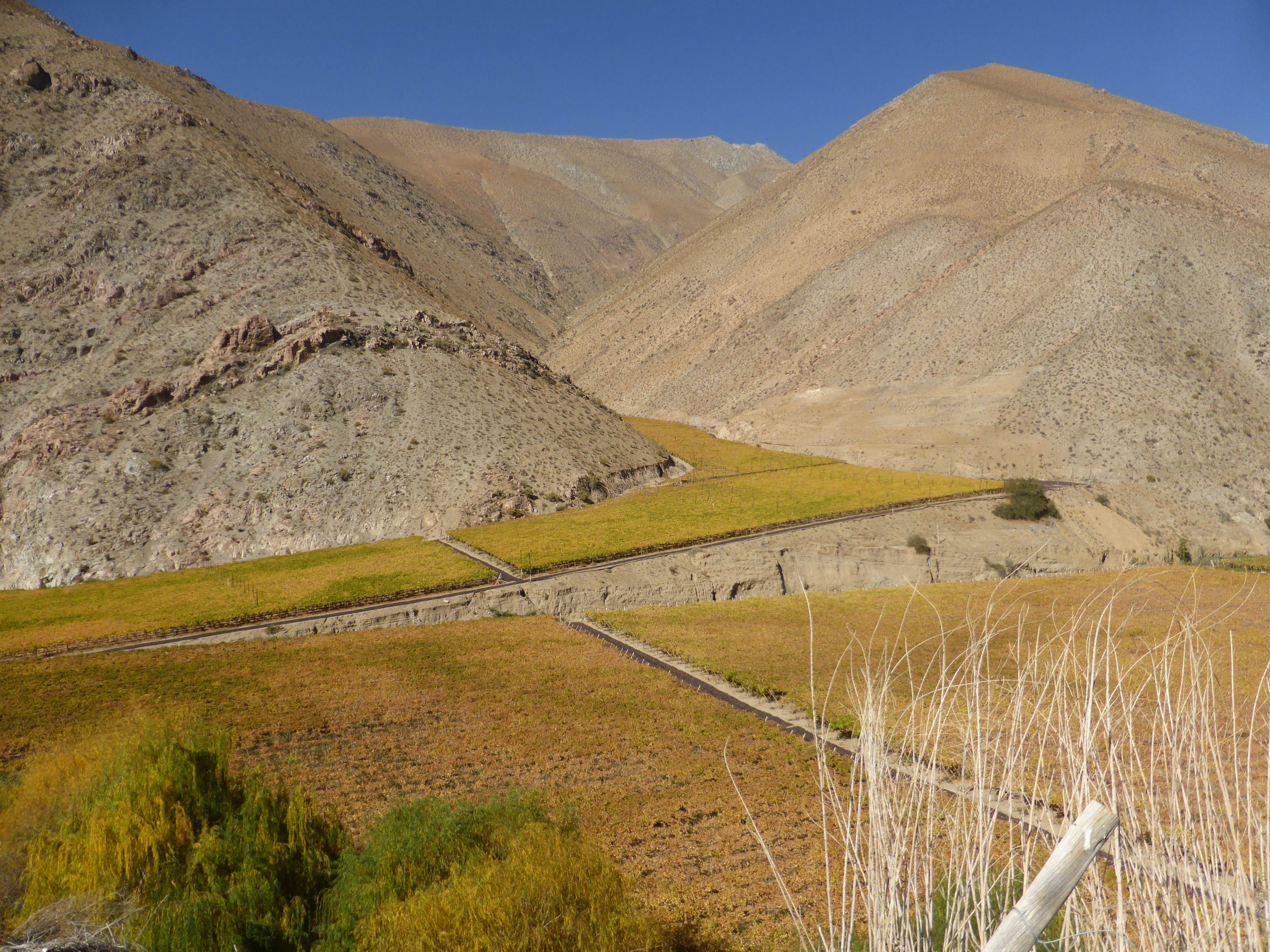 Entre cerros, en el Valle de Elqui, en terrenos junto al pueblo de Pisco Elqui, hay extensos viñedos.